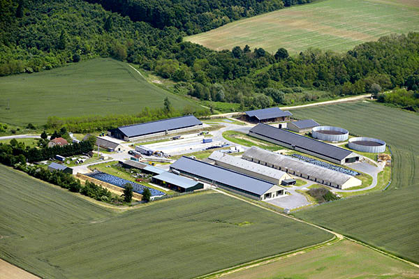 Légi fotó